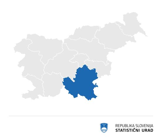 regije